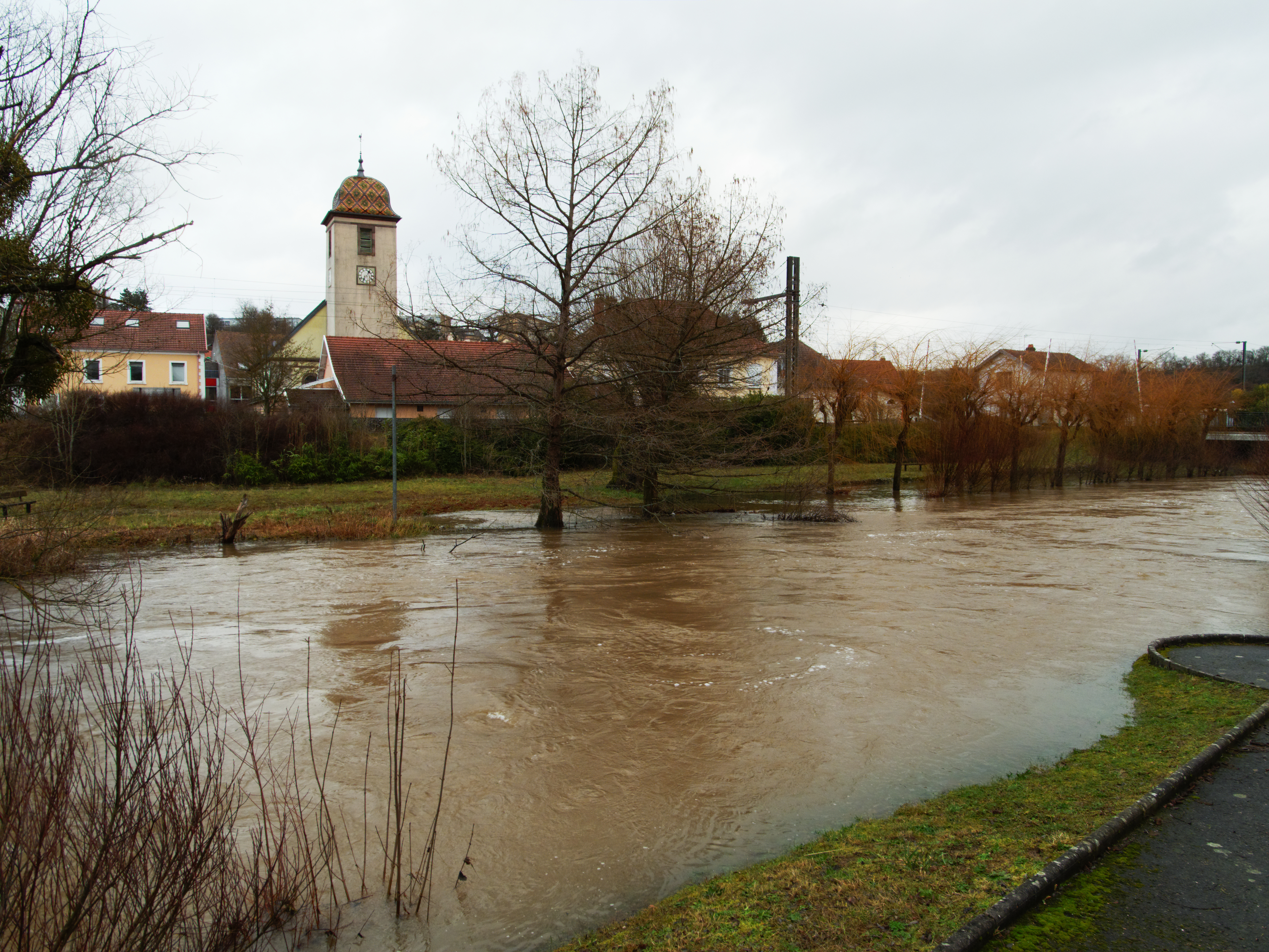 La Lizaine en crue à Bethoncourt.